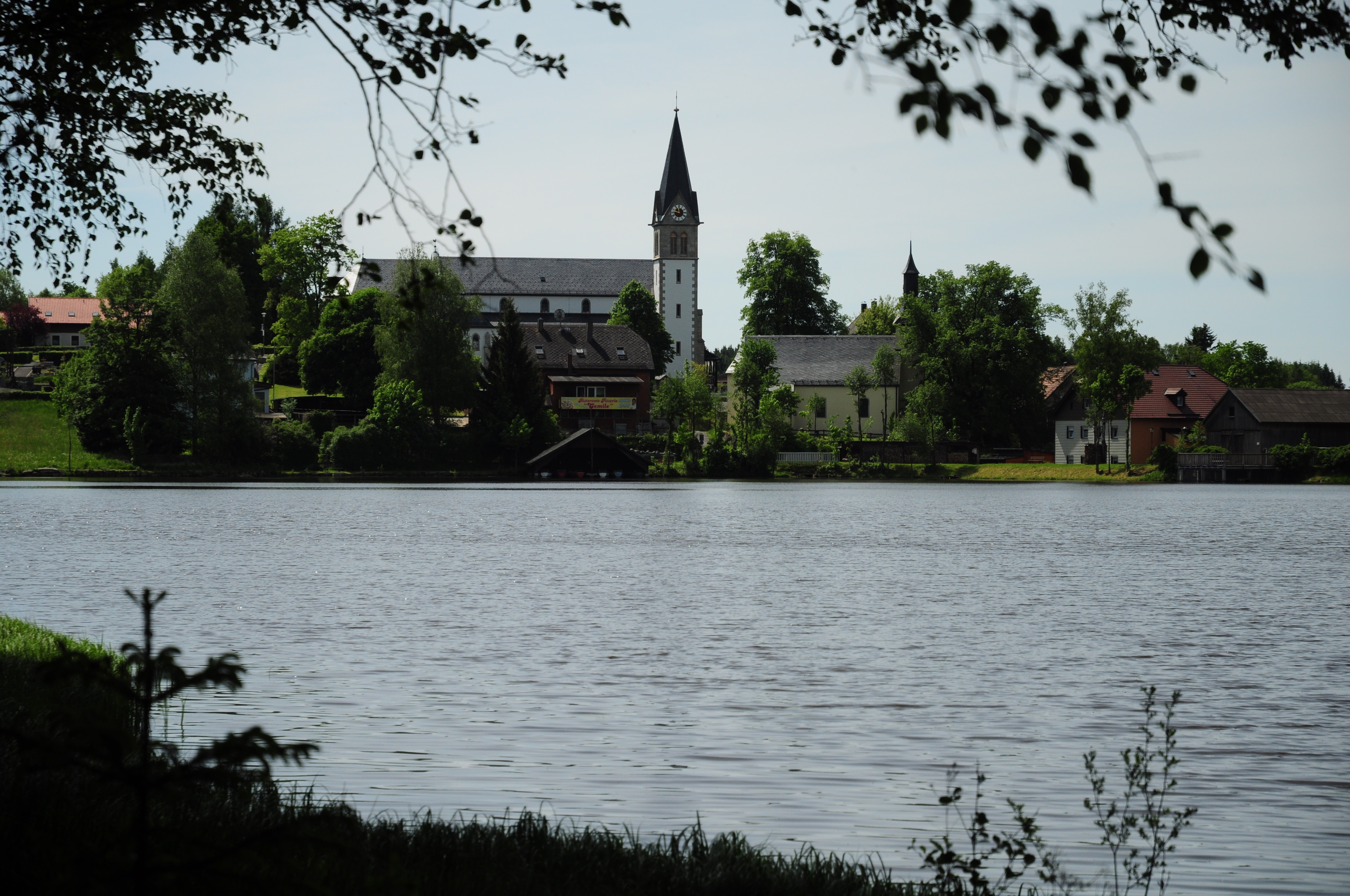 Fichtelgebirge, Oberfranken